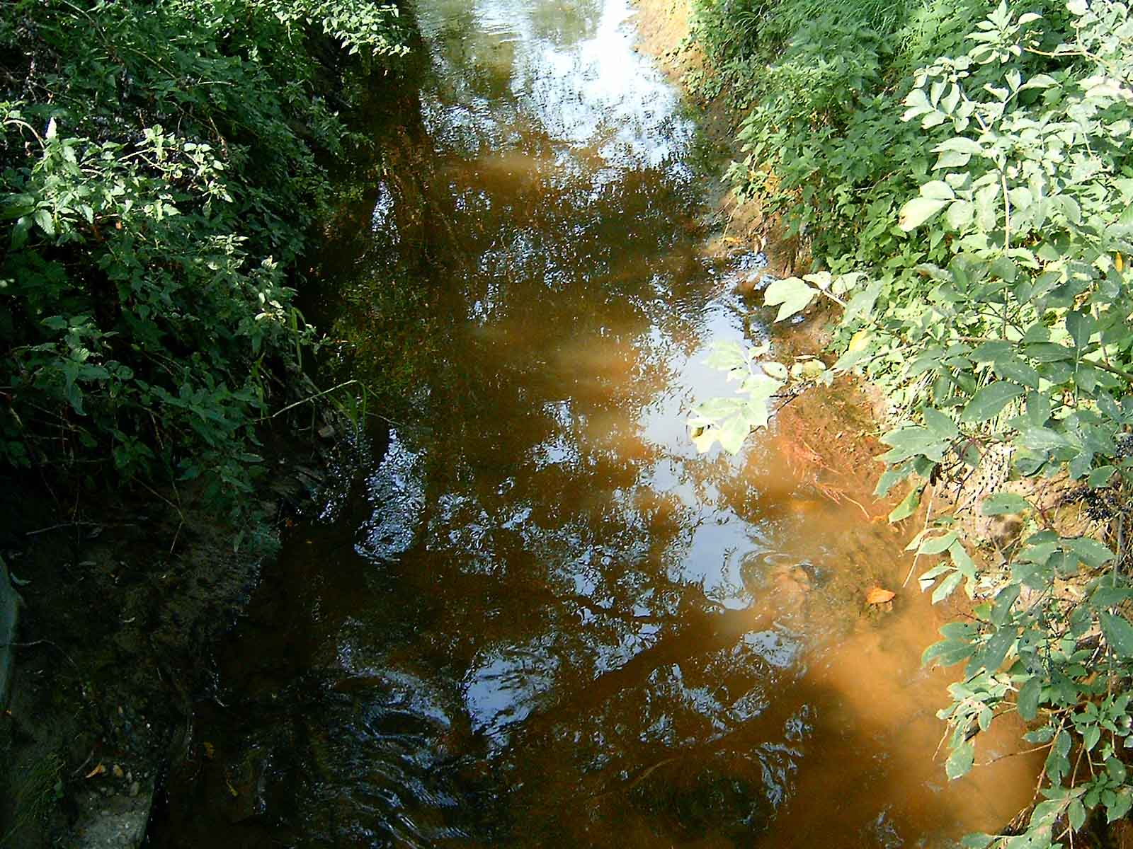 Az Aranyhegyi-patak Solymár környékén (Pest megye, Magyarország)